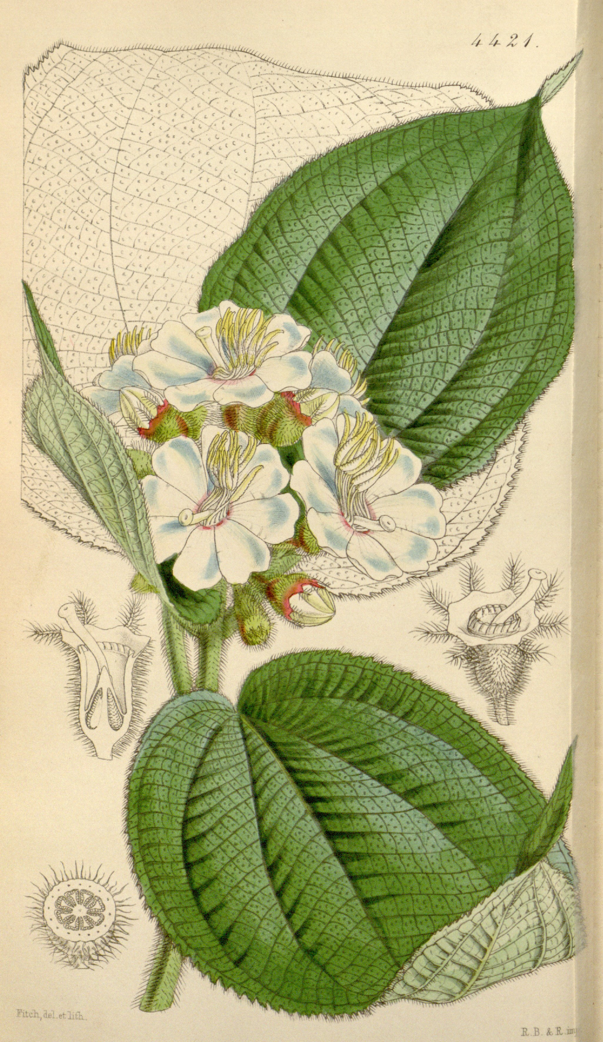 Heterotrichum macrodon (=Miconia macrodon), Melastomataceae